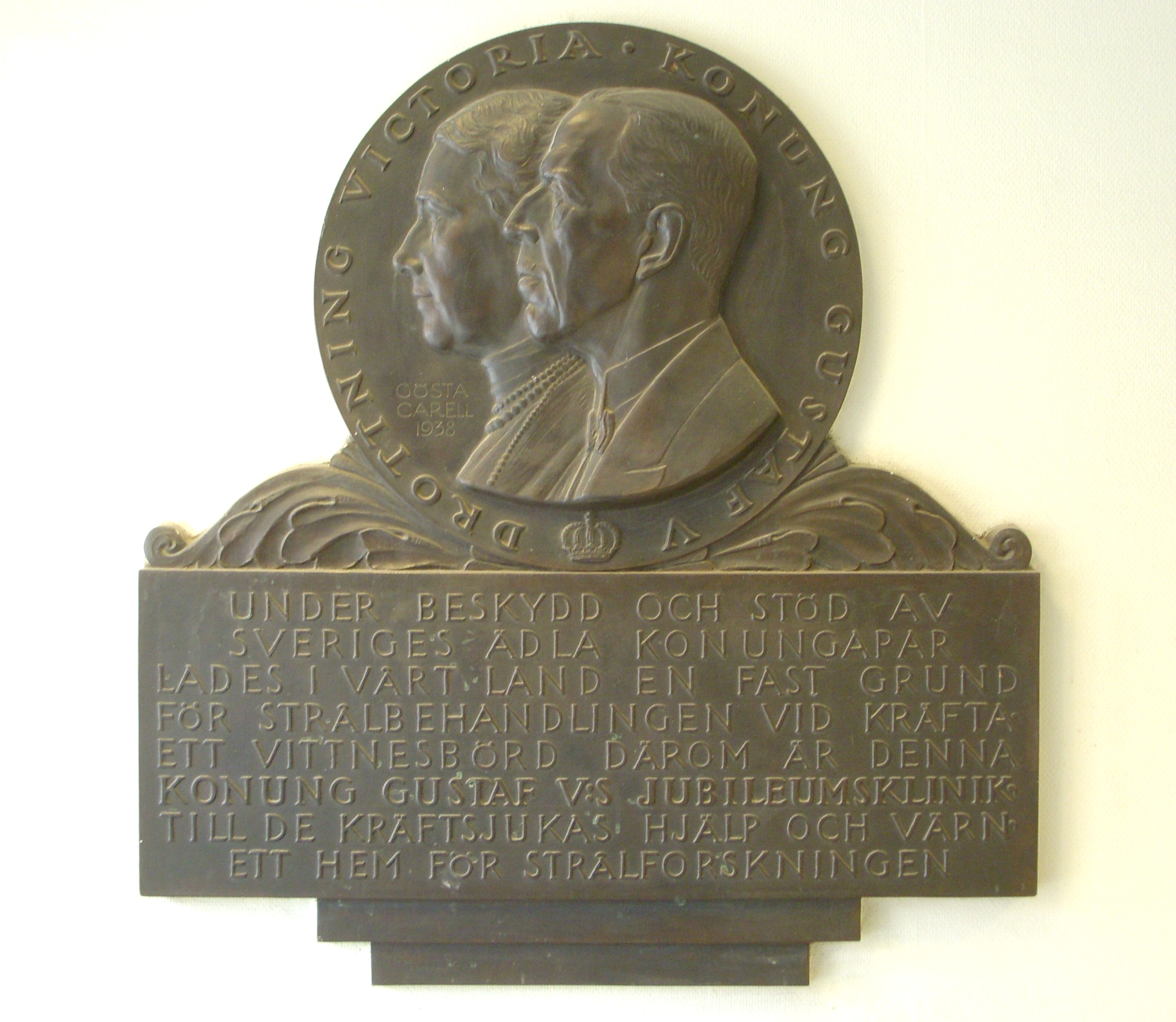 Minnestavla i Radiumhemmet, Solna